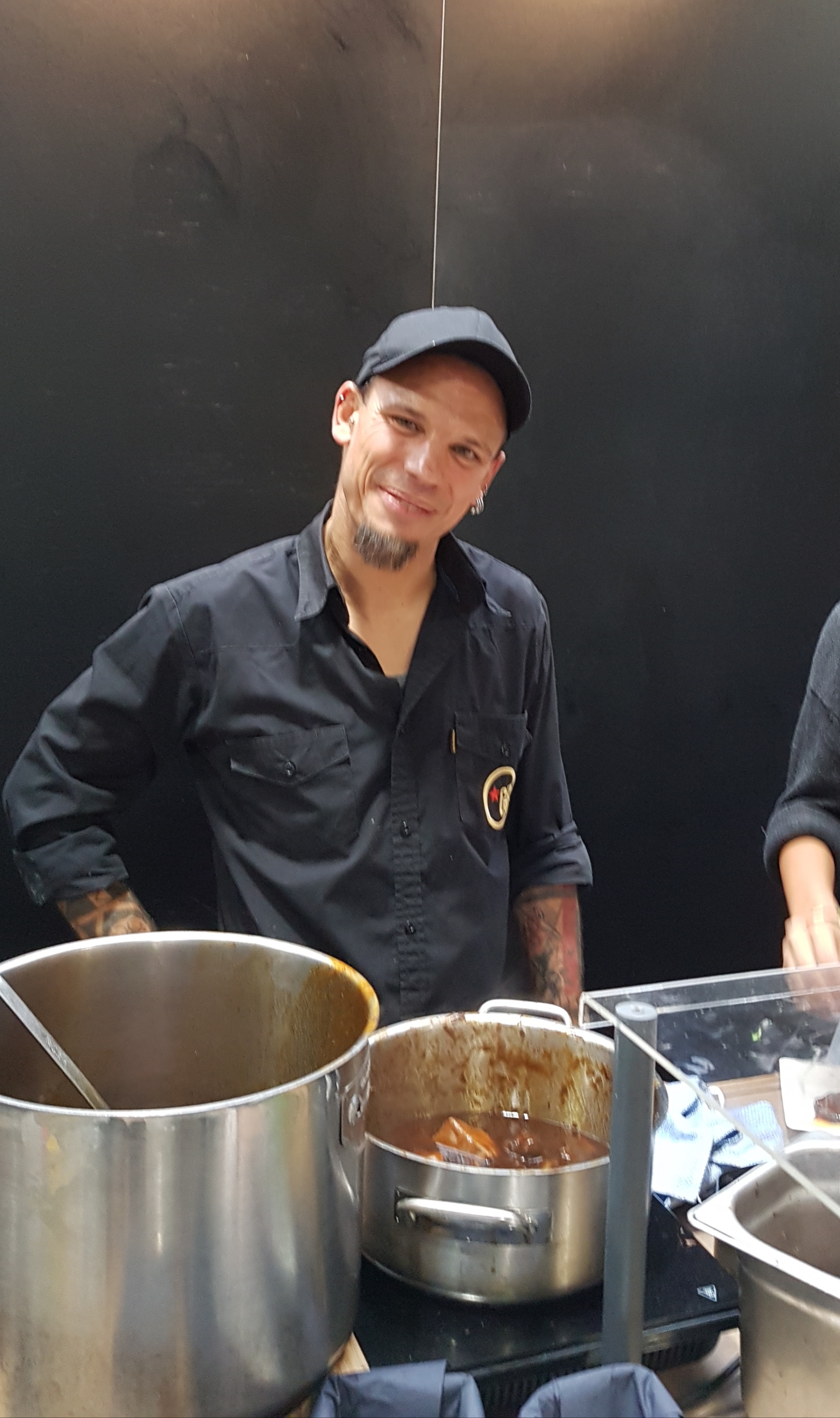 Bernd Arold, der aus dem Fernsehen (vorallem Pro7) bekannte Küchenchef auf der Eat&Style am 04.11.2018